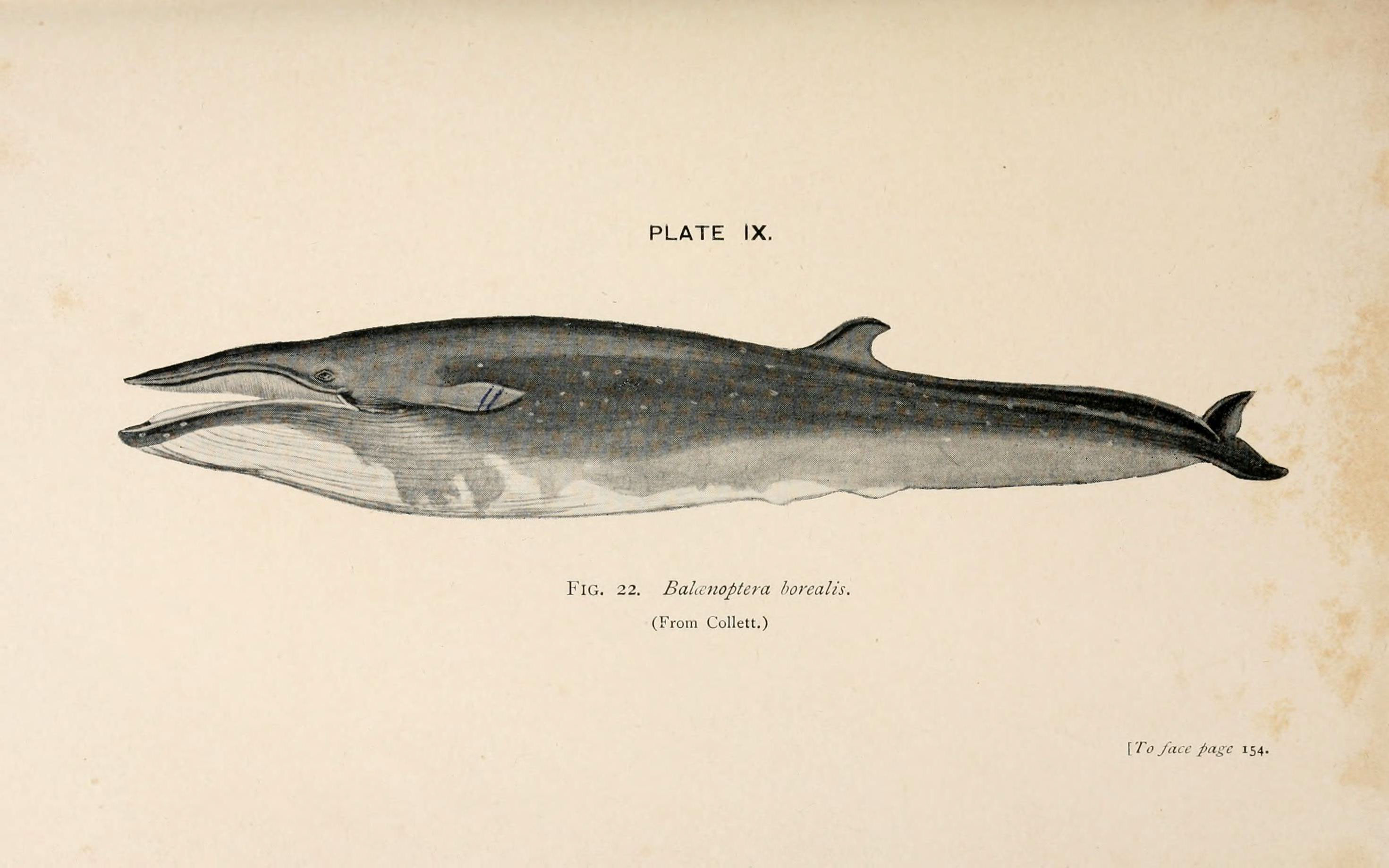 4 X LU 93 u E o I